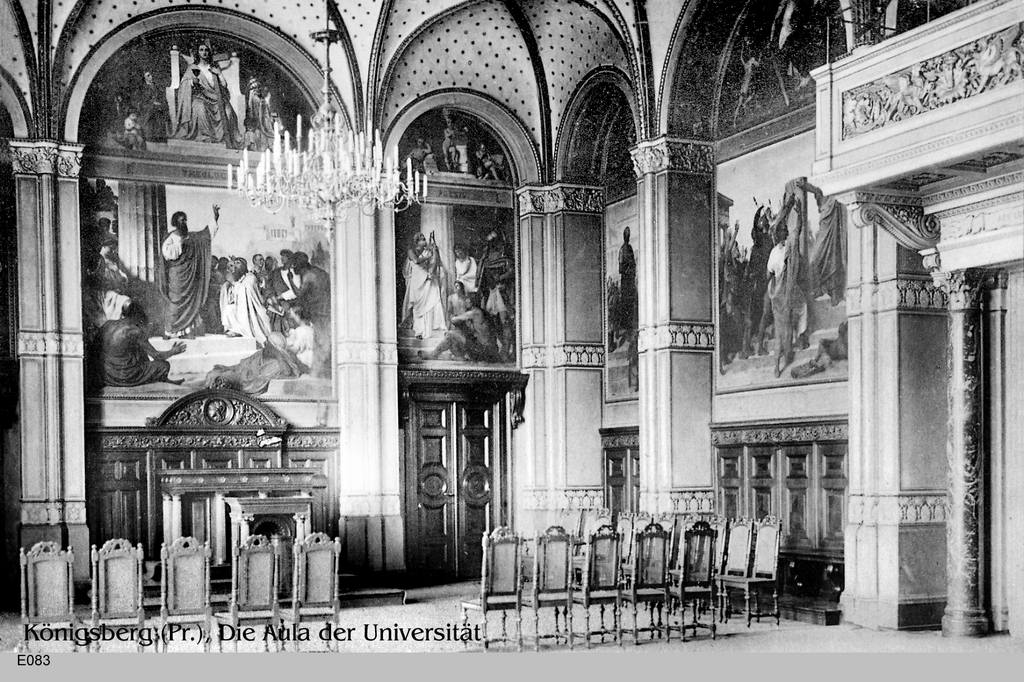 Die Aula der Albertina in Königsberg